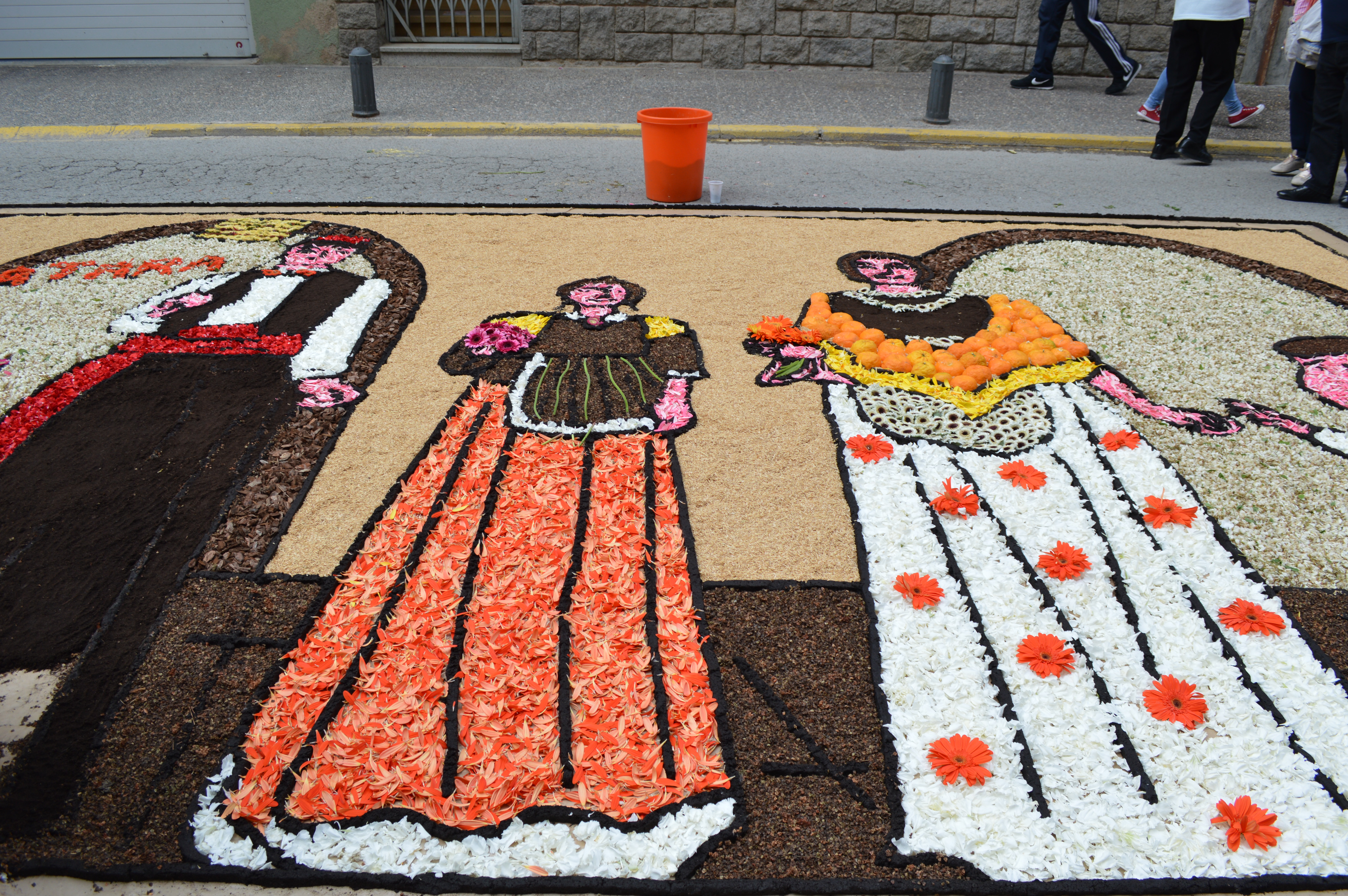 Una catifa que representa els Gegants d'Arbúcies: Sant Quirze, Santa Julita i la seva filla, la Carboneta.